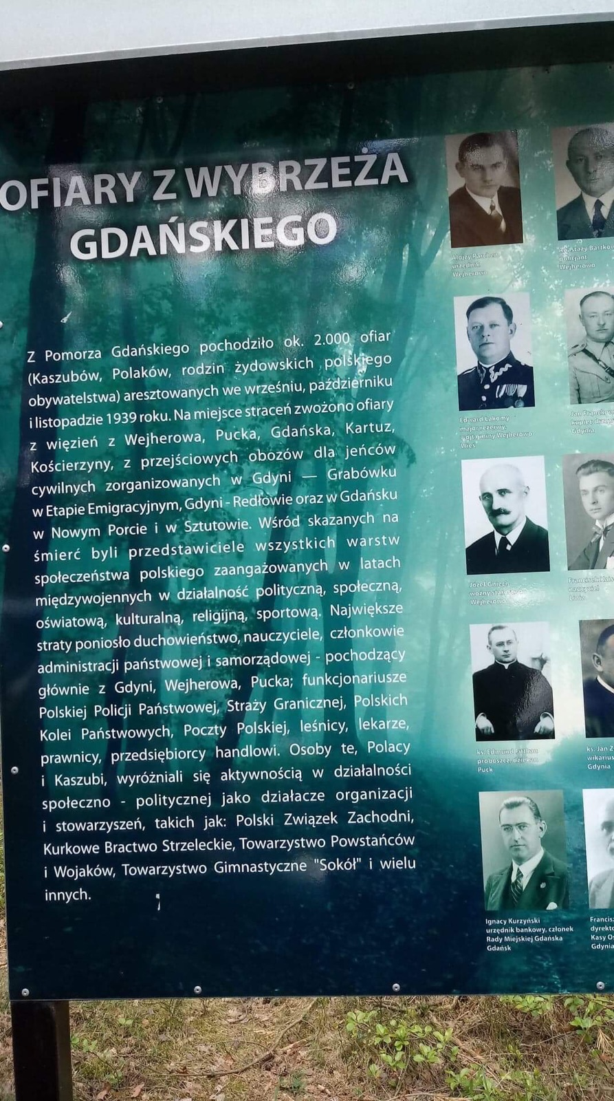 Tablica pamiątkowa w Piaśnicy, w okolicy miejsca gdzie Kurzyński i inni członkowie polskiego obywatelstwa zostali zamordowani na początku drugiej wojny światowej.